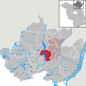 Oberuckersee in Brandenburg (Country) - District Uckermark